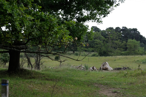 Totholz im Mainzer Sand II Aufgenommen am 01.06.2014